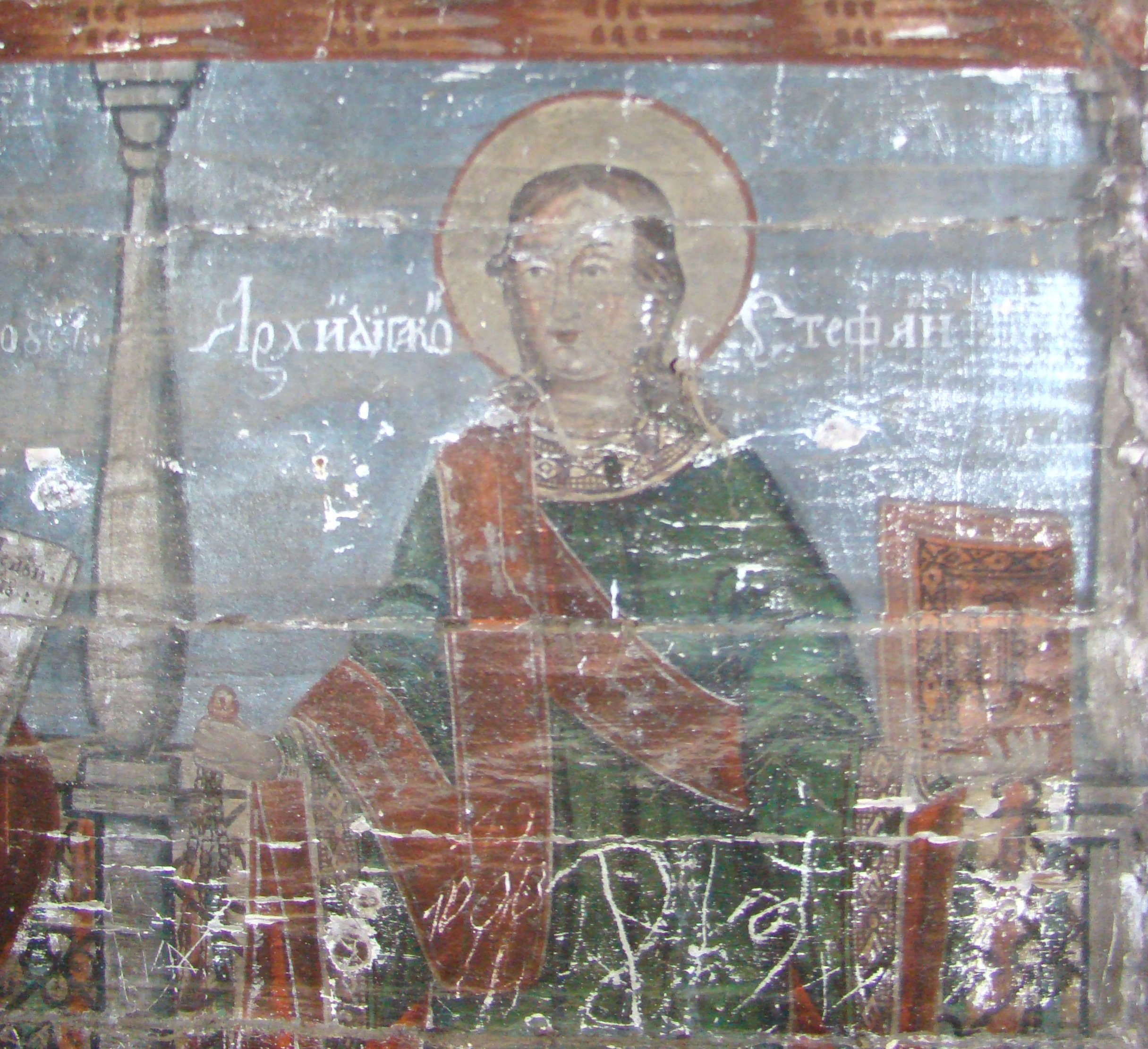 Arhidiaconul Ştefan, Biserica de lemn „Sf. Vasile cel Mare”, sat Dragu; comuna Dragu, judeţul Sălaj